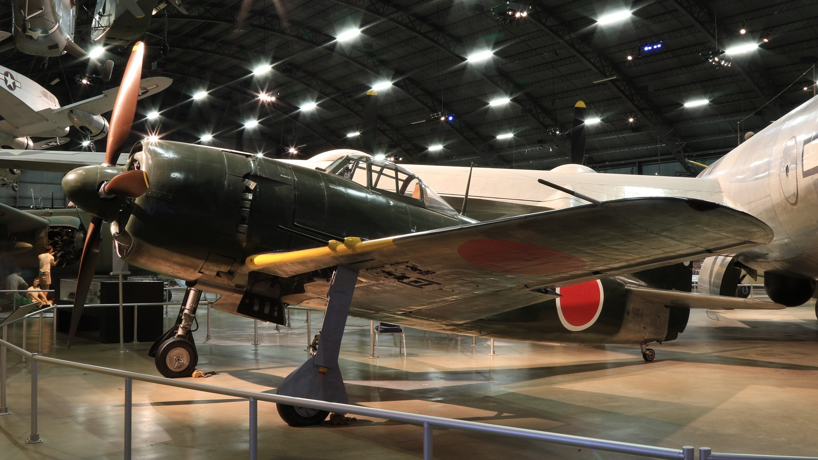 川西航空機 / 局地戦闘機 紫電 二一型（紫電改）/ National Museum of the U.S. Air Force / 2015年7月26日撮影